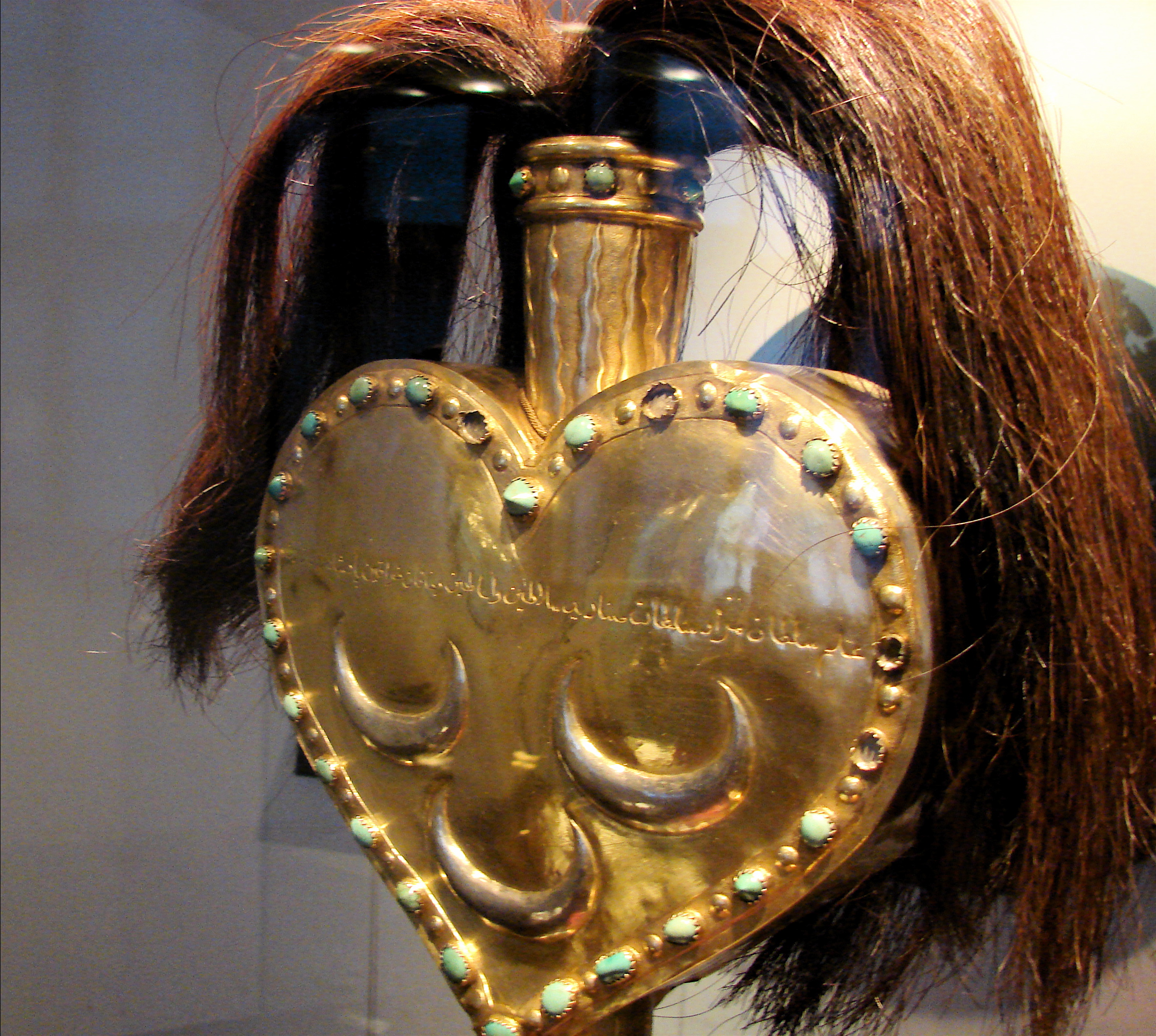 Standart hvis inskription hylder Sultan Murad, erobret i 1658 af admiral Cort Adeler, forgyldt sølv og turkiser, Nationalmuséet, København